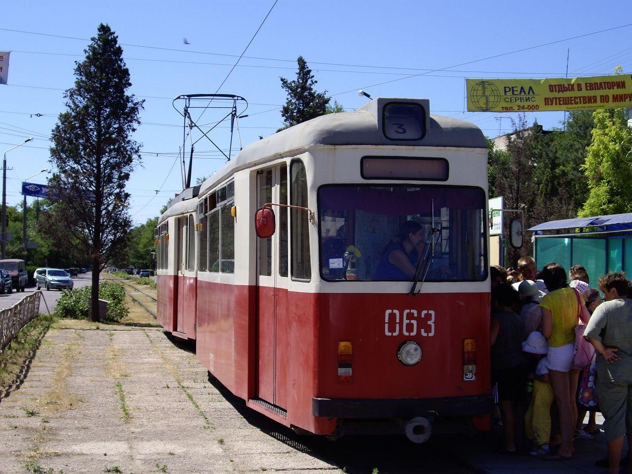 Евпатория. Трамвайная система из двух вагонов "Гота" №№ 3-63